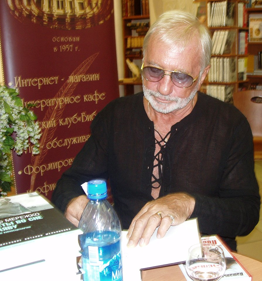 Виктор Мережко на презентации сборника сценариев